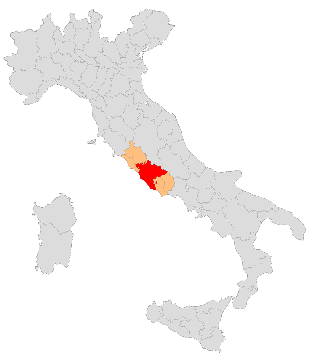 Il circondario di Roma nella provincia omonima.